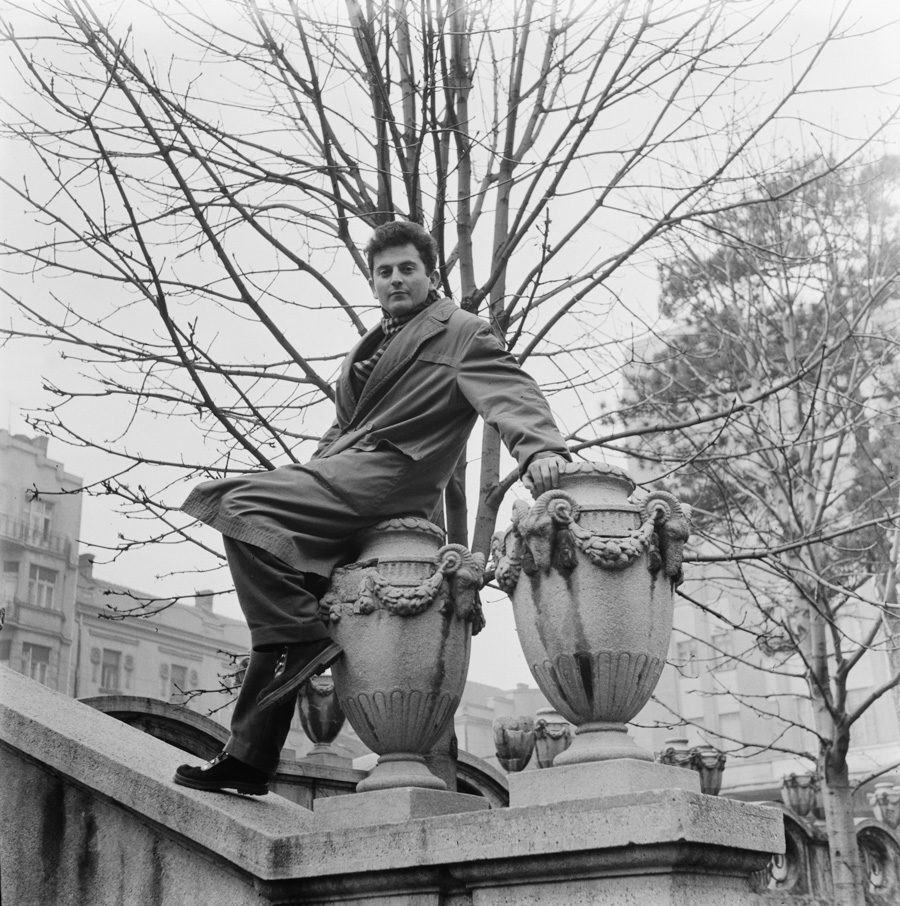 Srpski (latinica): Mirko Lovrić, fotograf